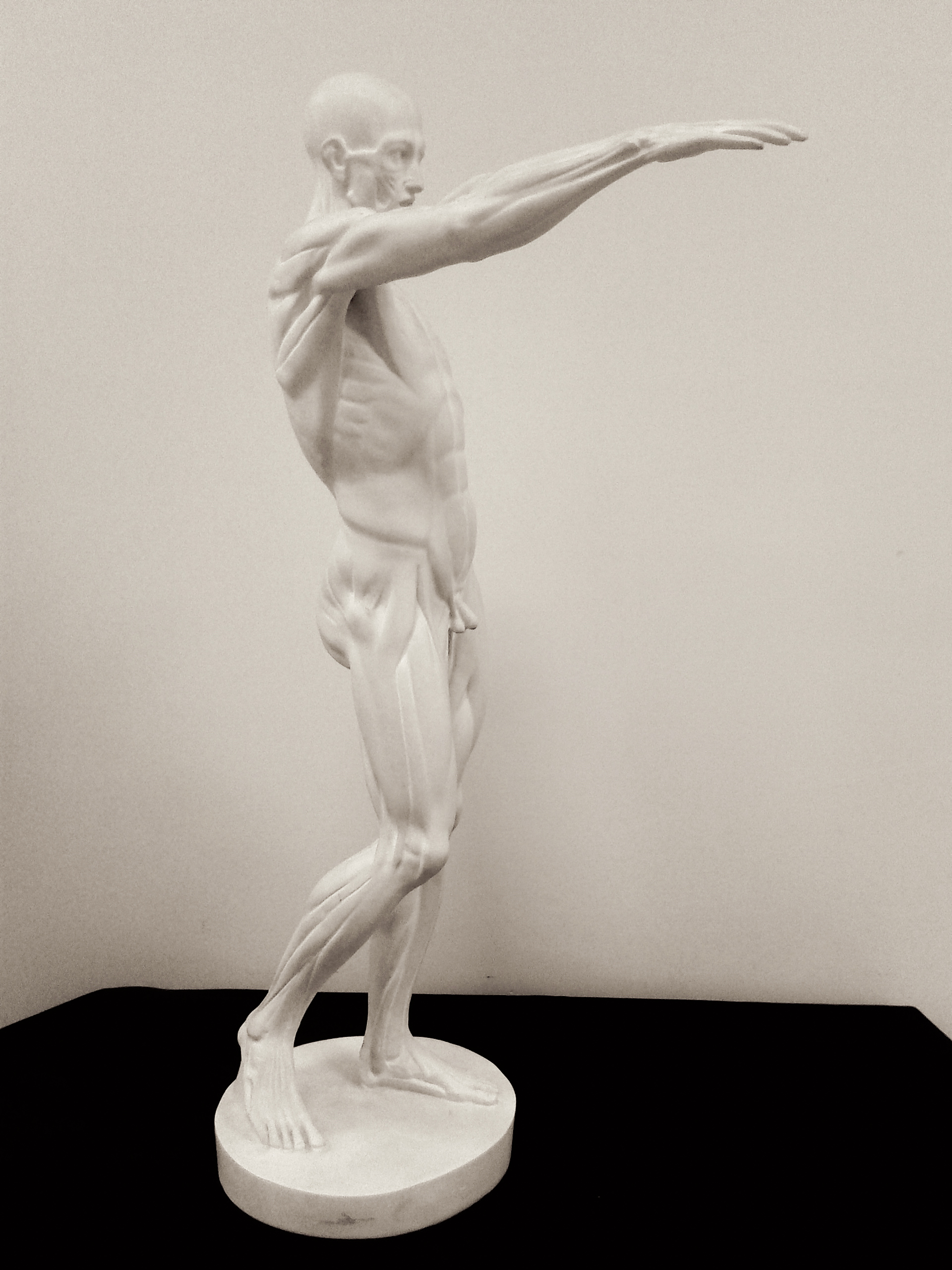 Sculpture dite l'écorché de Houdon (1767) vue du côté droit